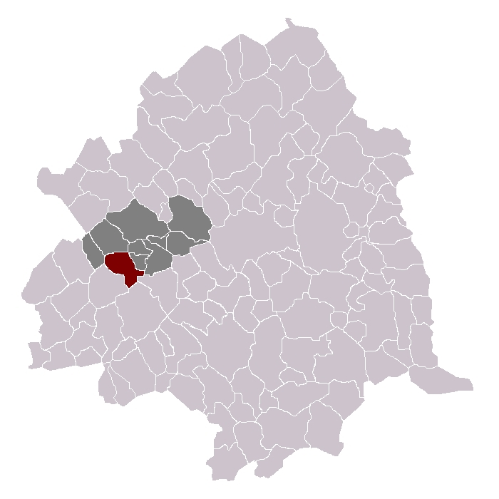 Beaucamps-Ligny dans son canton et son arrondissement